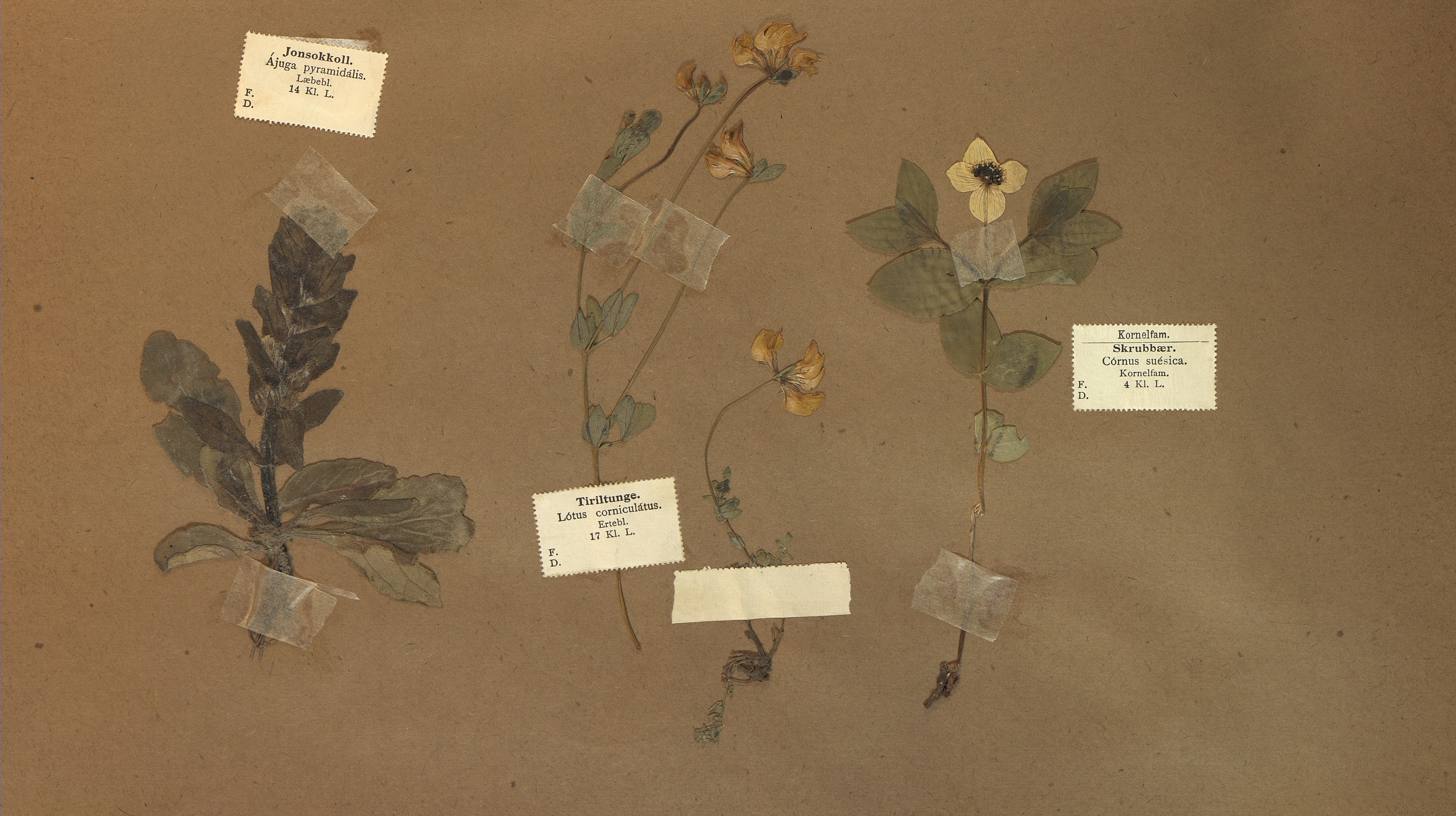 Utsnitt fra Anders Torjussens herbarium fra 1906. PA-1123